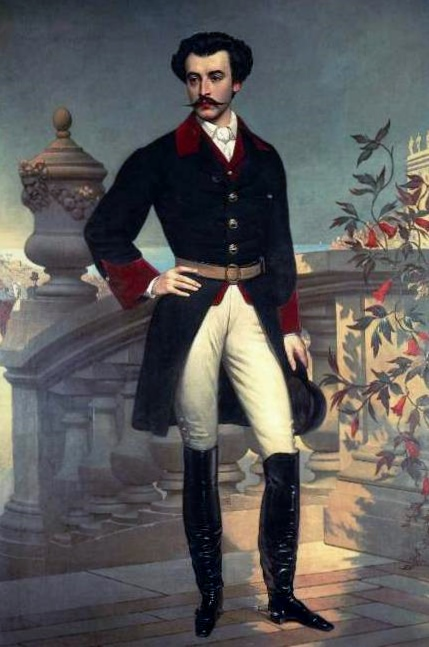 Retrato del empresario, político y fílántropo chileno del siglo XIX Luis Cousiño realizado en París junto con el de su esposa Isidora Goyenechea